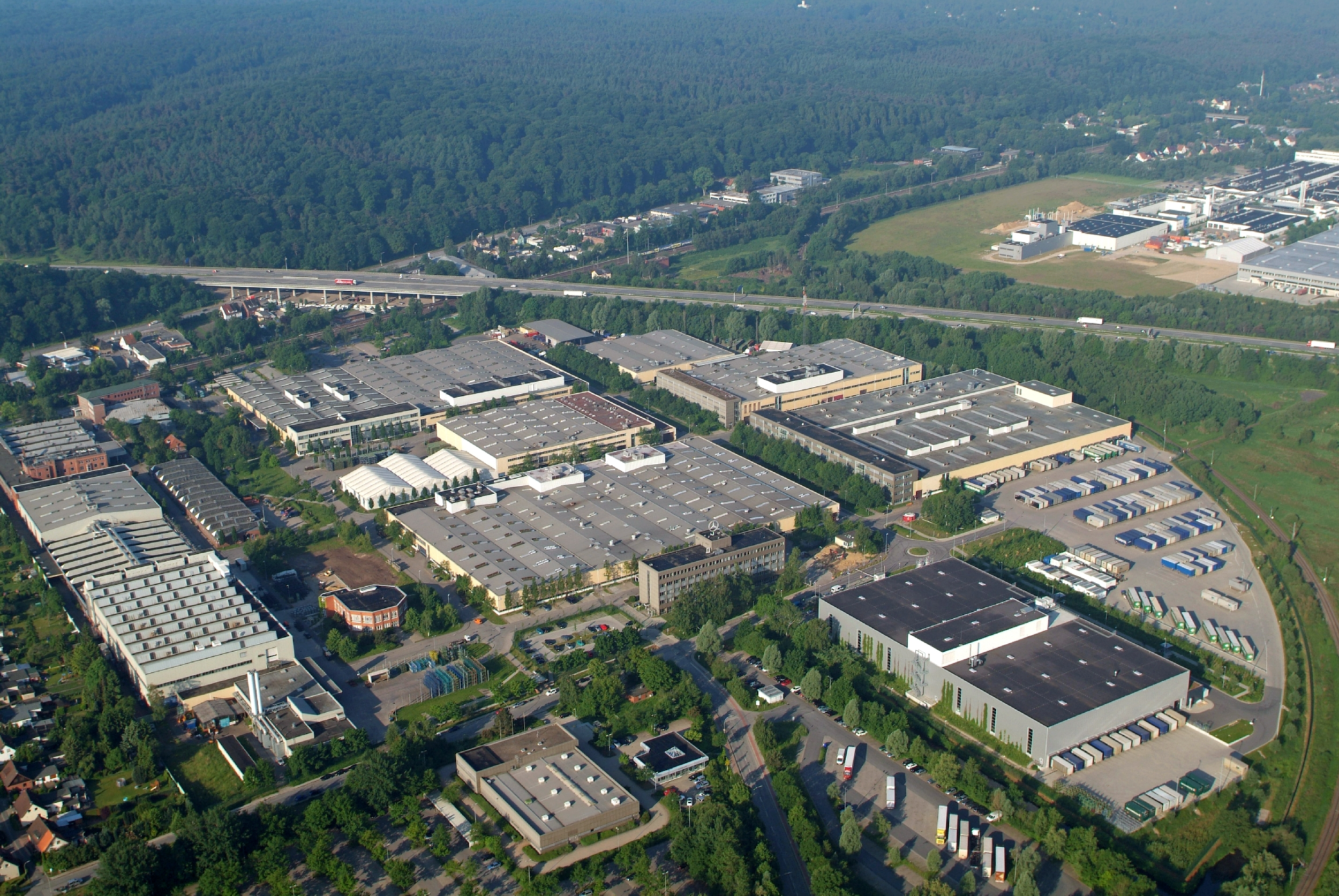 Projekt Heißluftballon. Blick auf Mercedes-Benz-Werk und Bundesautobahn 7 in Hamburg-Heimfeld.